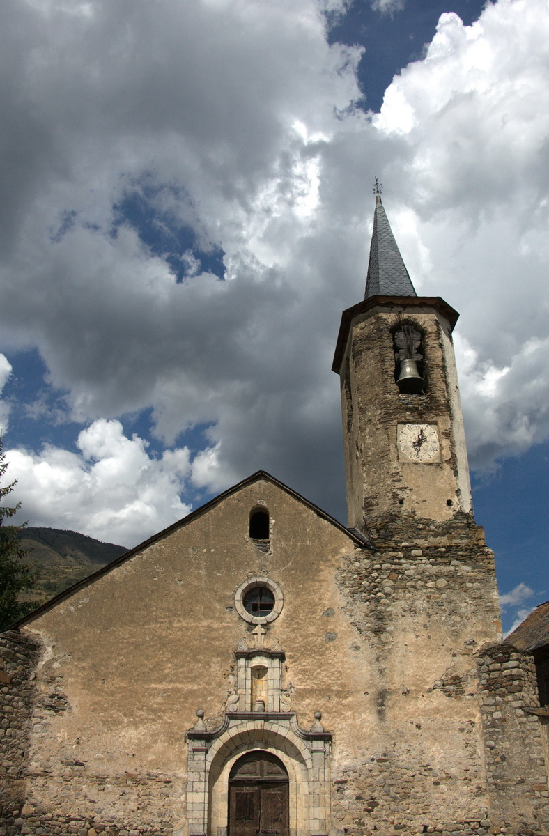 Església de Sant Joan de Gil (Alt Àneu)